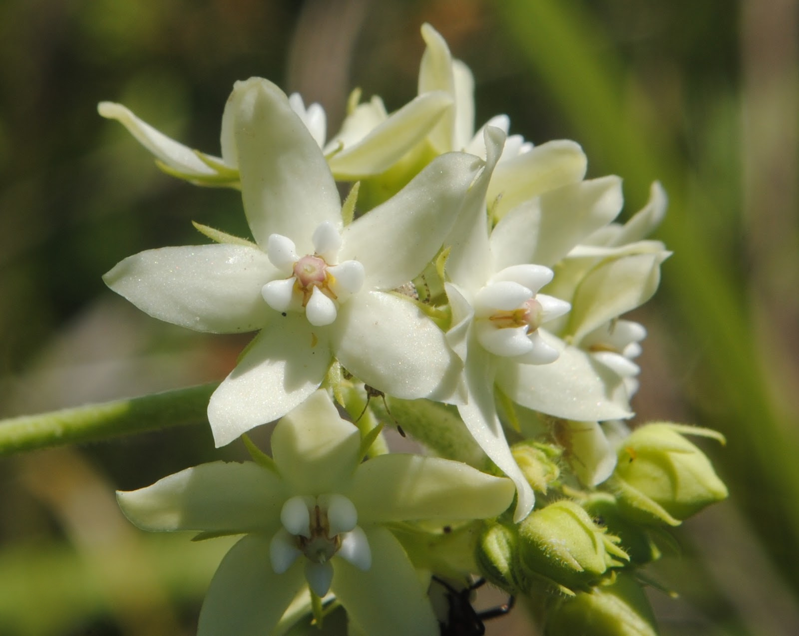 Funastrum flavum. Apocynaceae. Fotos tomadas en pajonal al margen de la Ruta Interbalnearia en Colinas de Solymar, departamento de Canelones, Uruguay.